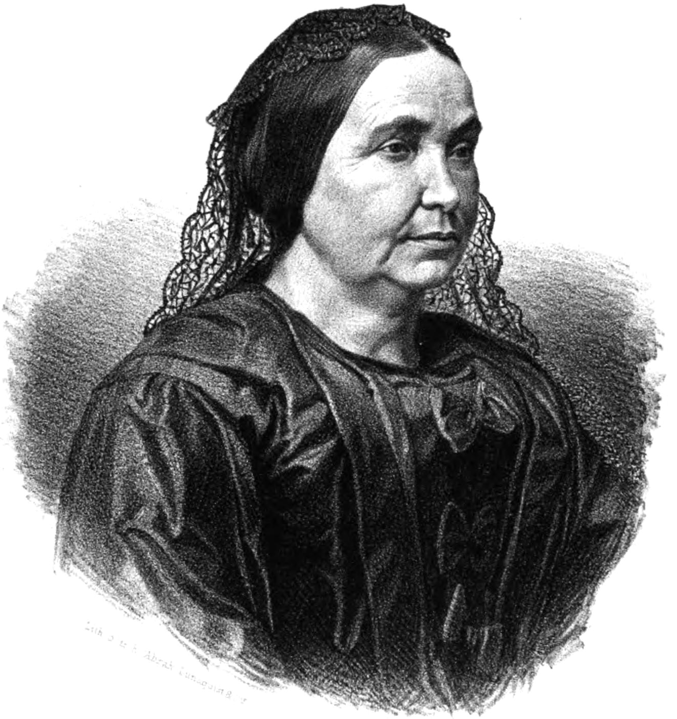 Den svenska författaren Emilie Flygare-Carlén.